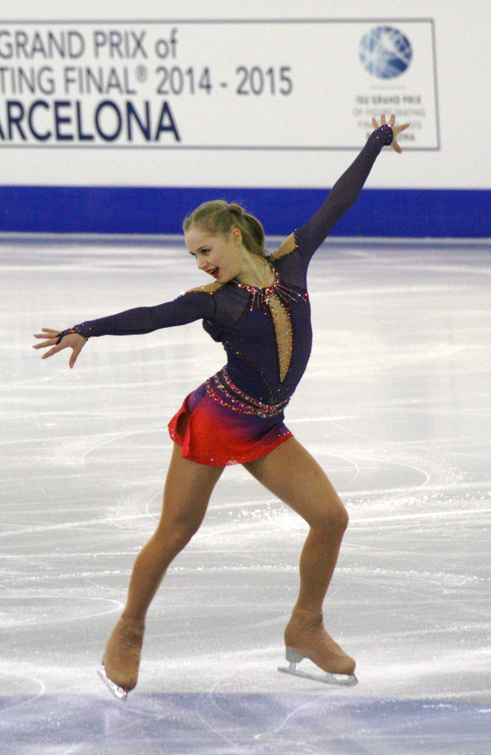 Серафима Саханович (Россия) на финале Гран-при среди юниоров сезона 2014-2015.